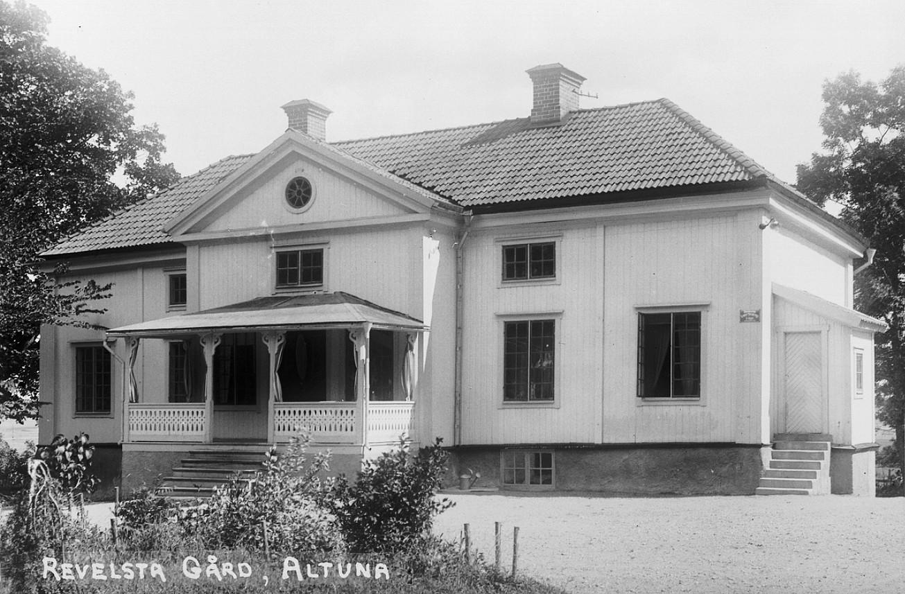 Revelsta gård